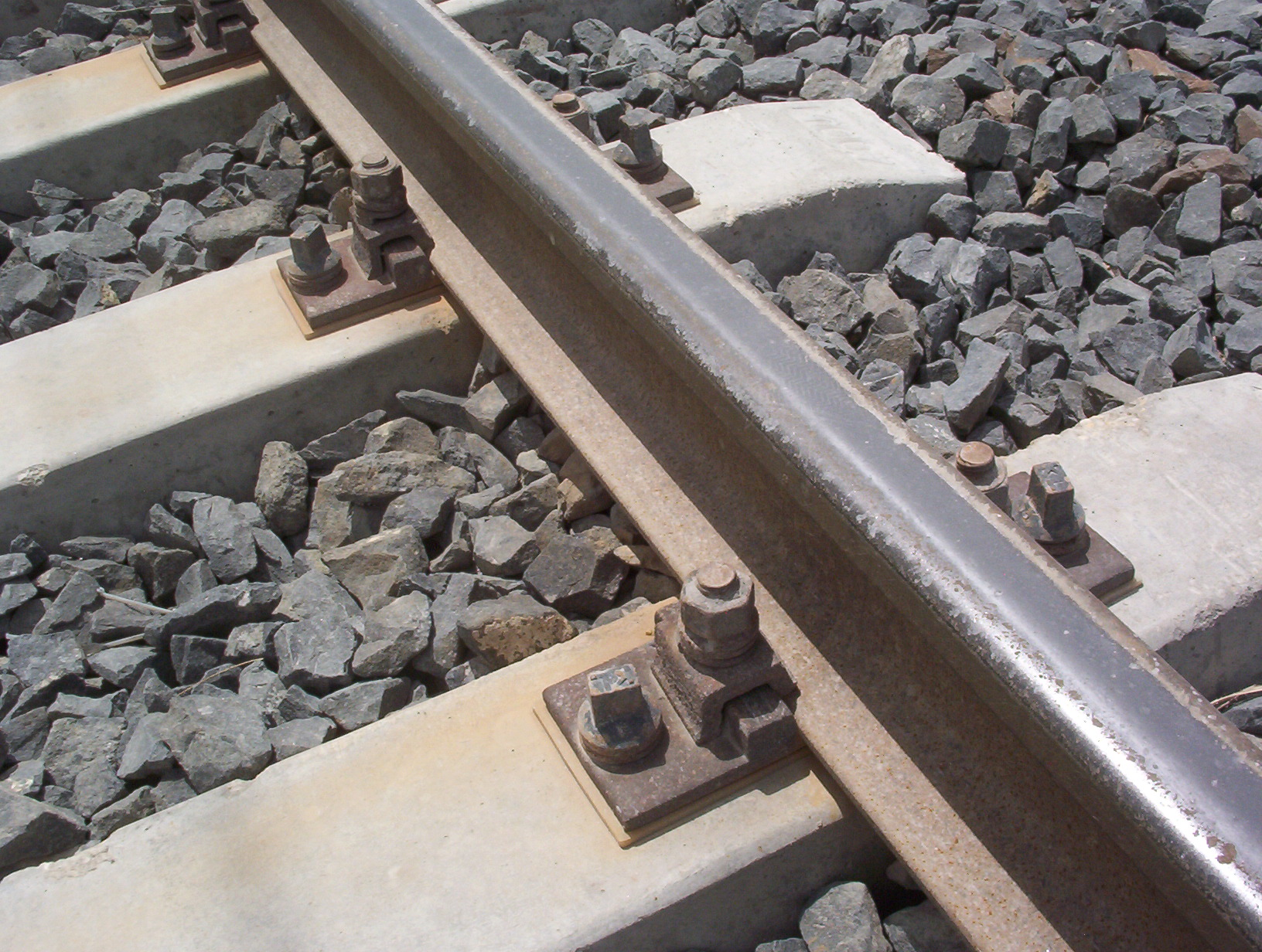 LM vasbetonaljon, Geo rendszerű sínleerősítés (Délegyháza–Kiskunlacháza)